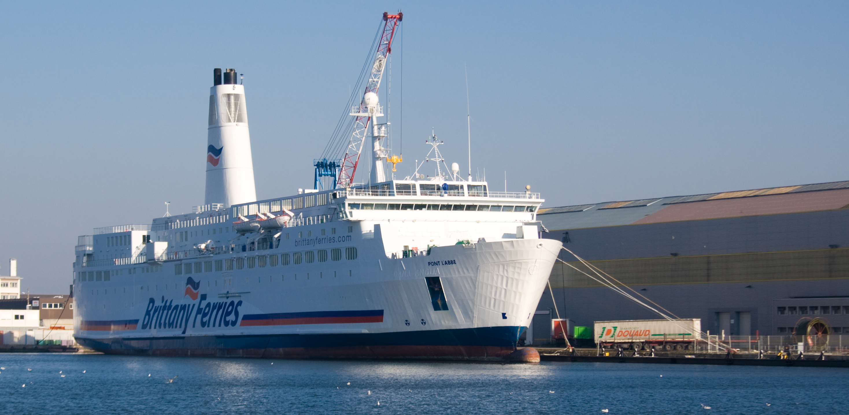 Le ferry Pont L'Abbé, de la compagnie Brittany Ferries dans le port de Saint-Nazaire. IMO Number: 7615414 MMSI Number: 228237600 Callsign: FMIG Length: 153 m Beam: 26 m